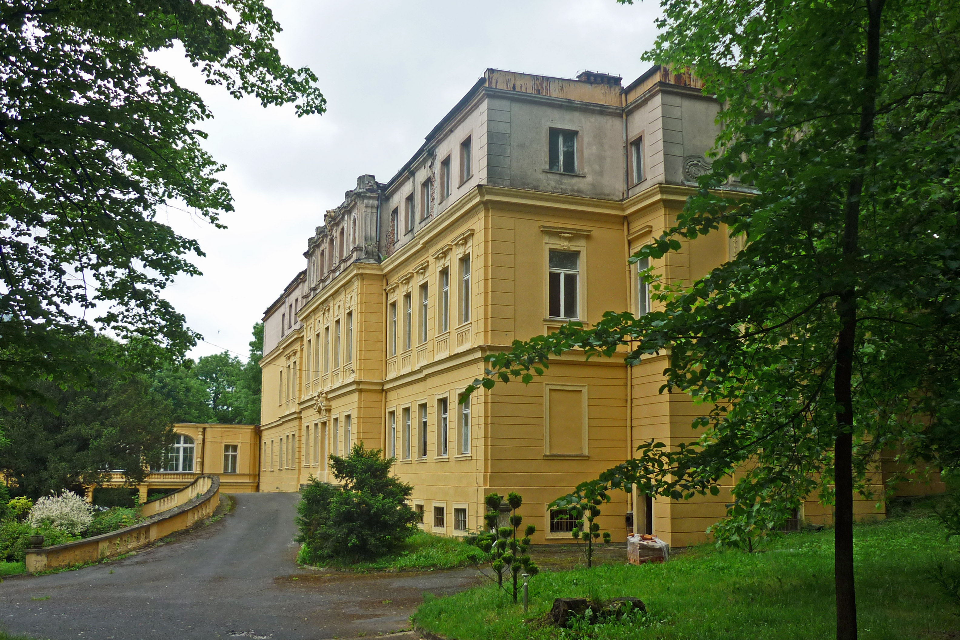 Ehemalige evangelische Kirche in Tiefhartmannsdorf (Podgórki) im Bober-Katzbach-Gebirge in Niederschlesien. Die Kirche wurde Anfang des 19. Jhdts. durch Brand zerstört. Der Kirchturm wird als Aussichtsturm genutzt.